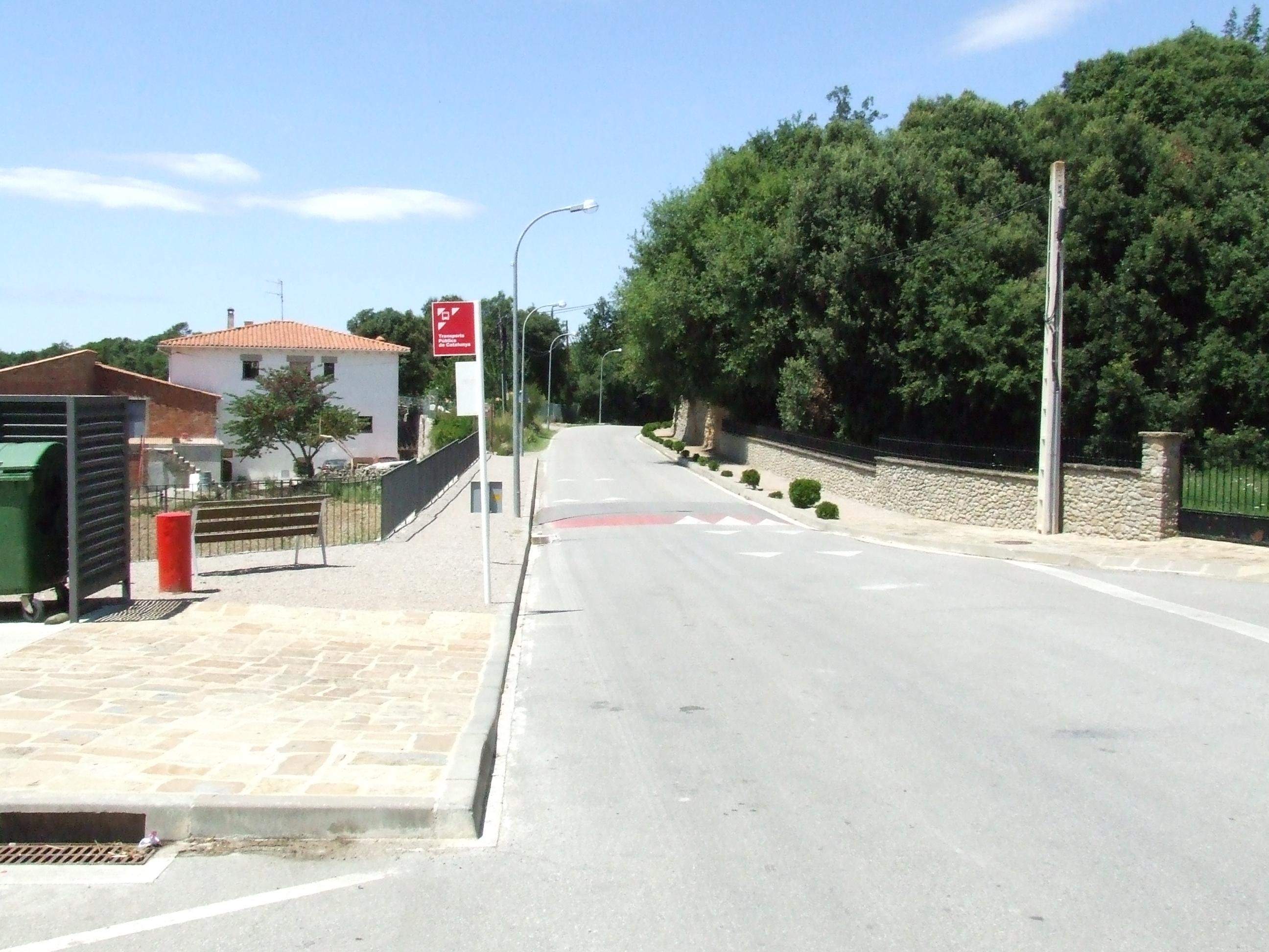 La BV-1342 a l'entrada en el poble (Castellcir, Moianès)